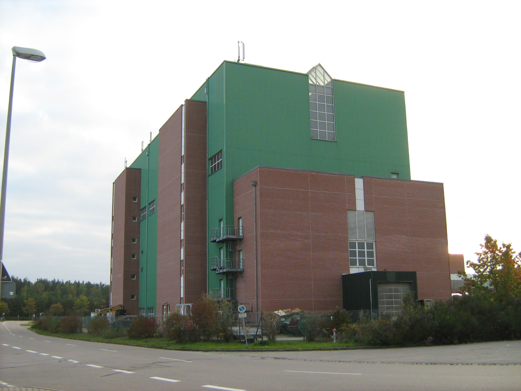 Brennelemente-Eingangslager der Wiederaufarbeitungsanlage Wackersdorf; Karl-Rapp-Straße 3, 92442 Wackersdorf